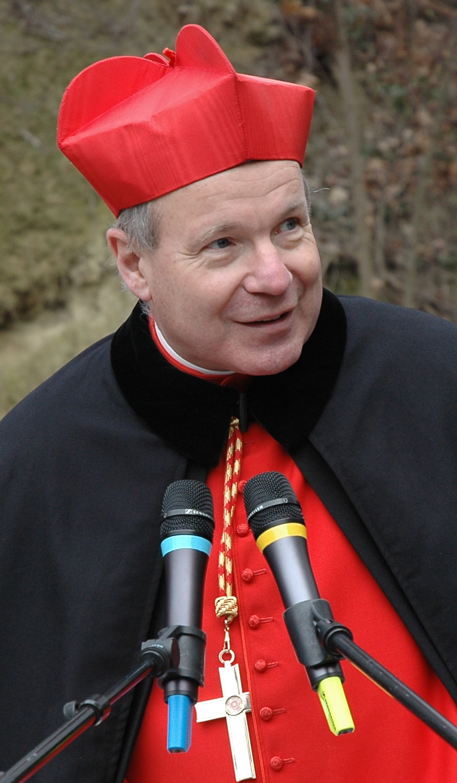 Kardinal Schönborn bei der Barbarafeier in Matzen am 9. Dezember 2007